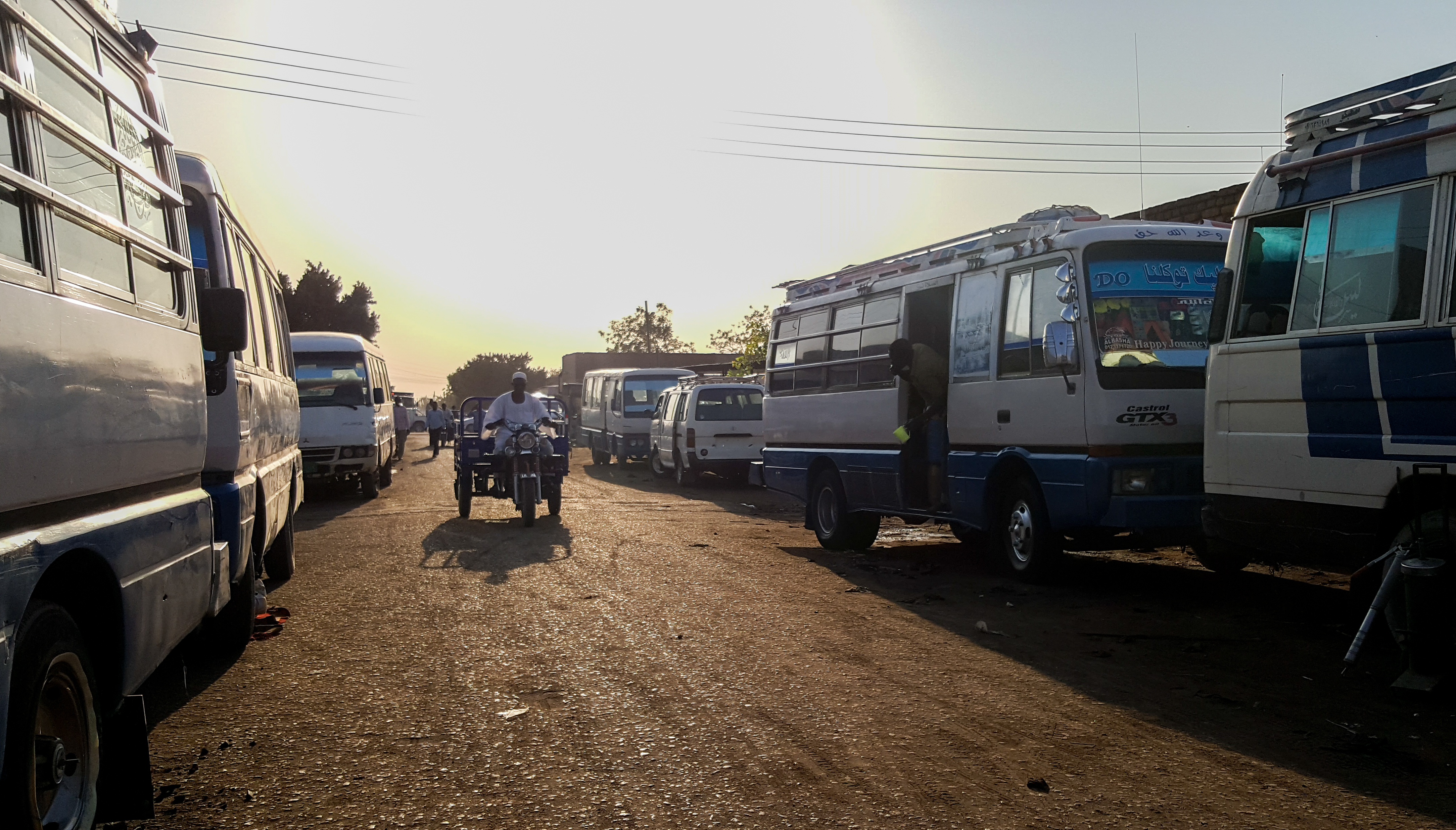 WLASudan2020 This is an image with the theme "Africa on the Move or Transport" from: Sudan السودان . ولاية جنوب دارفور .نيالا . السوق الشعبي .موقف السفريات